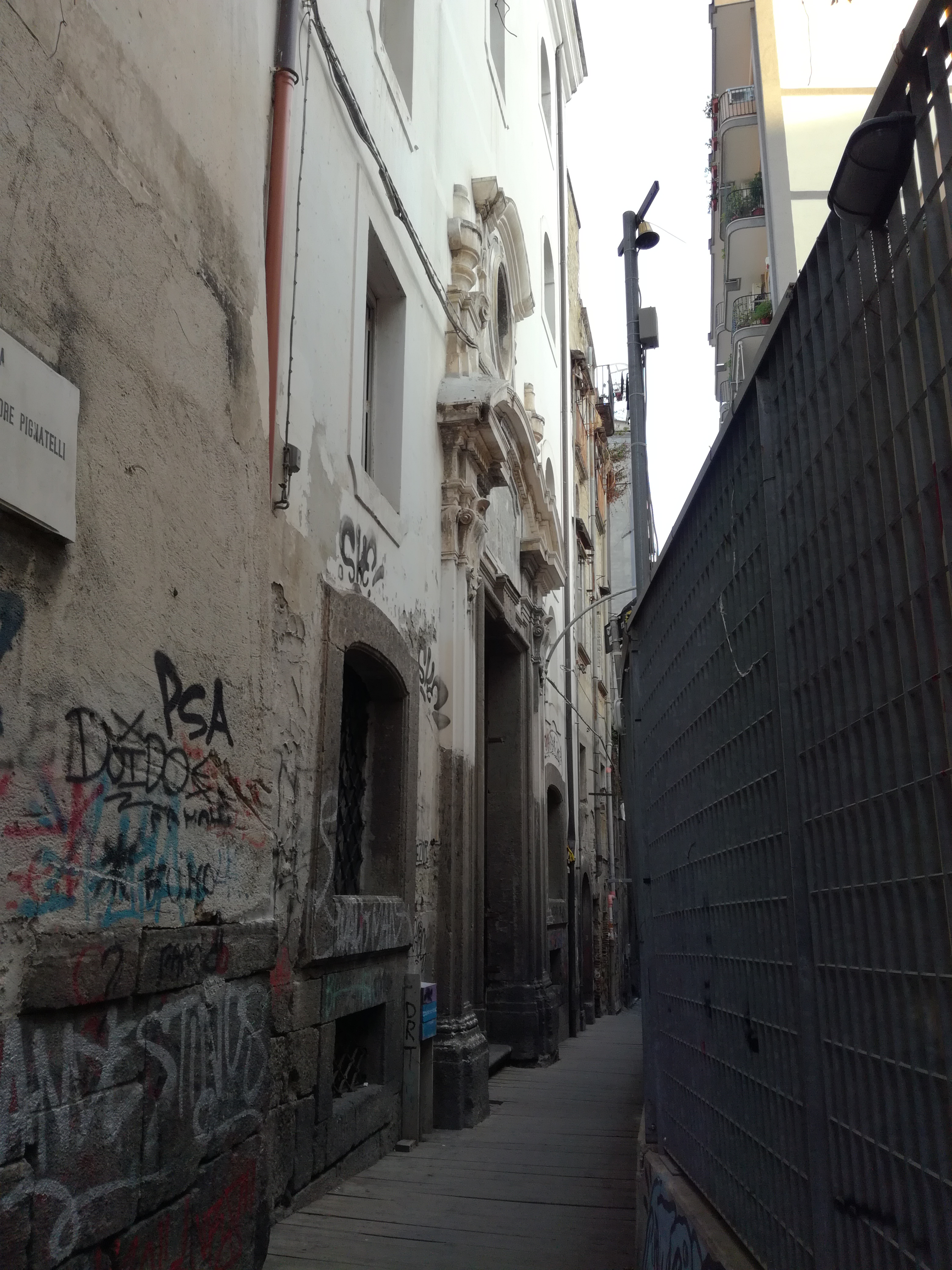 Oratorio S.Maria della Fede (esterno)